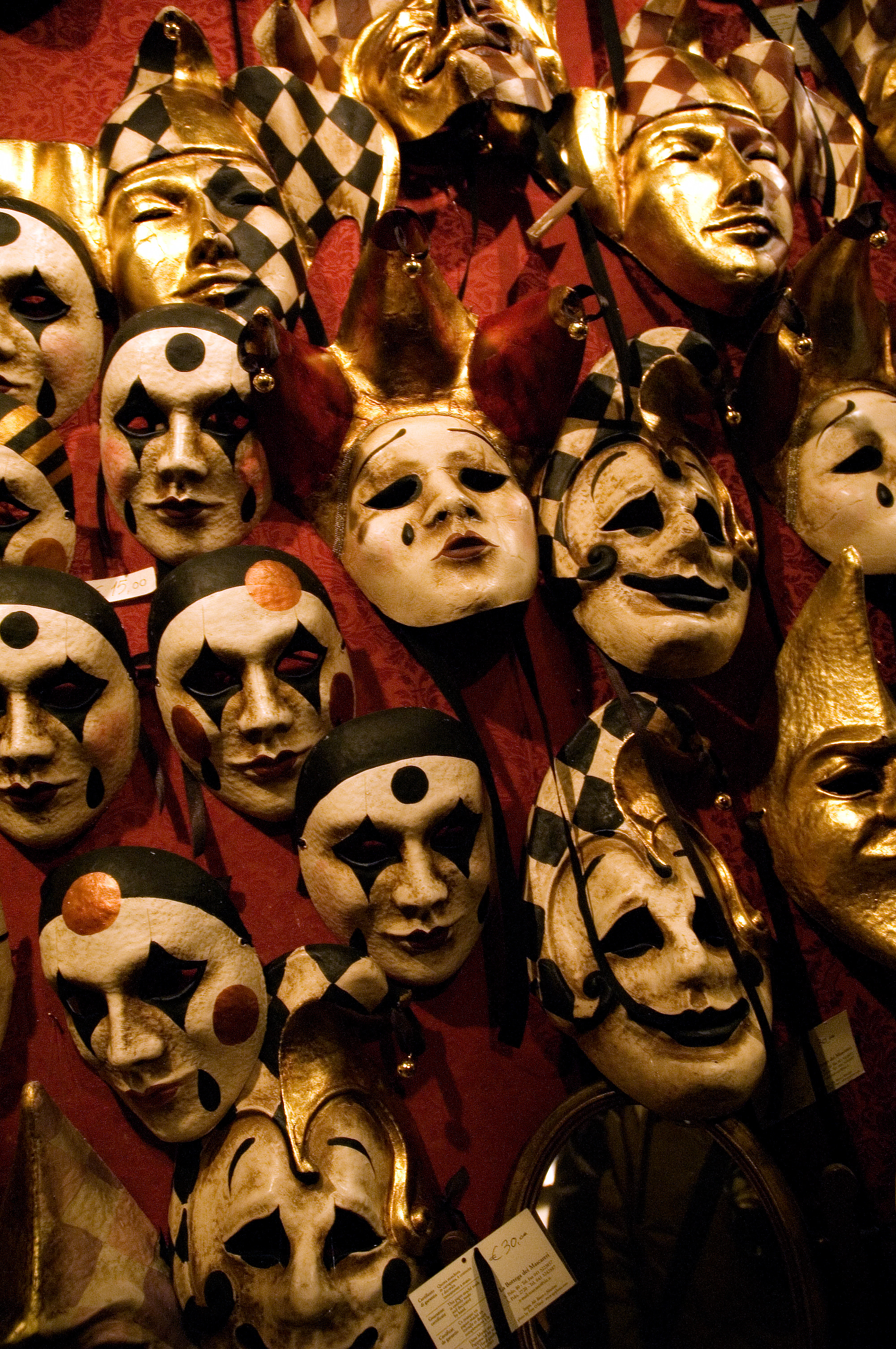 Carnavals maskers uit venetië